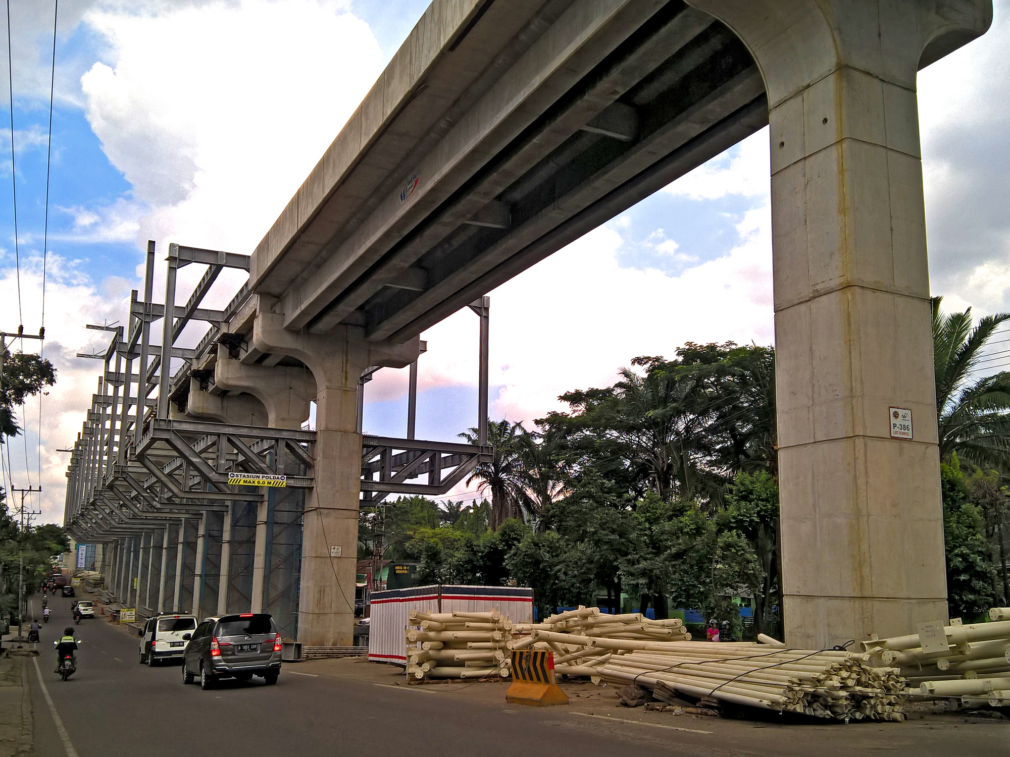 Palembang LRT